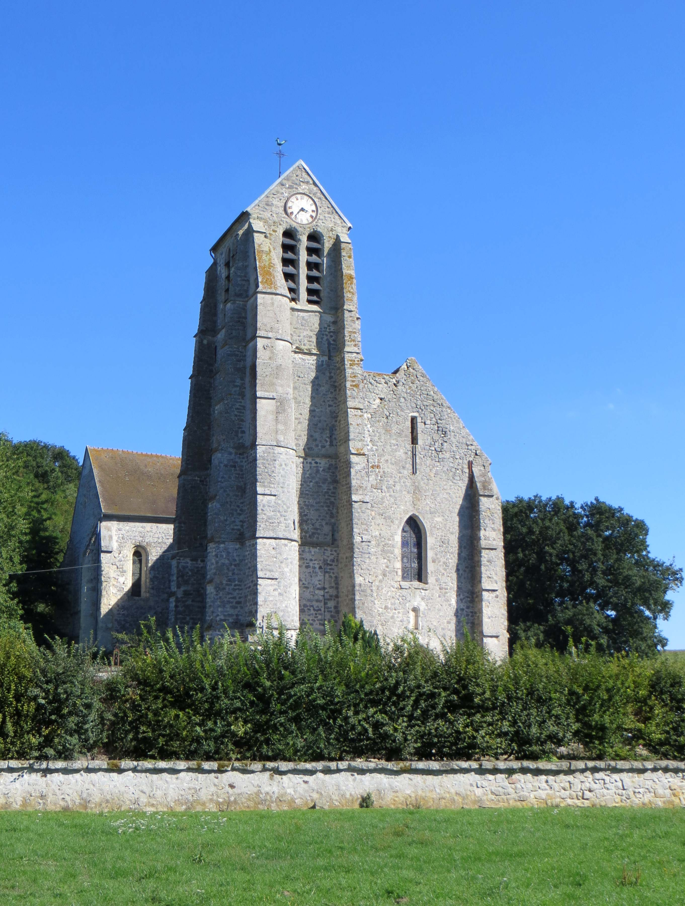 Vue de l'église